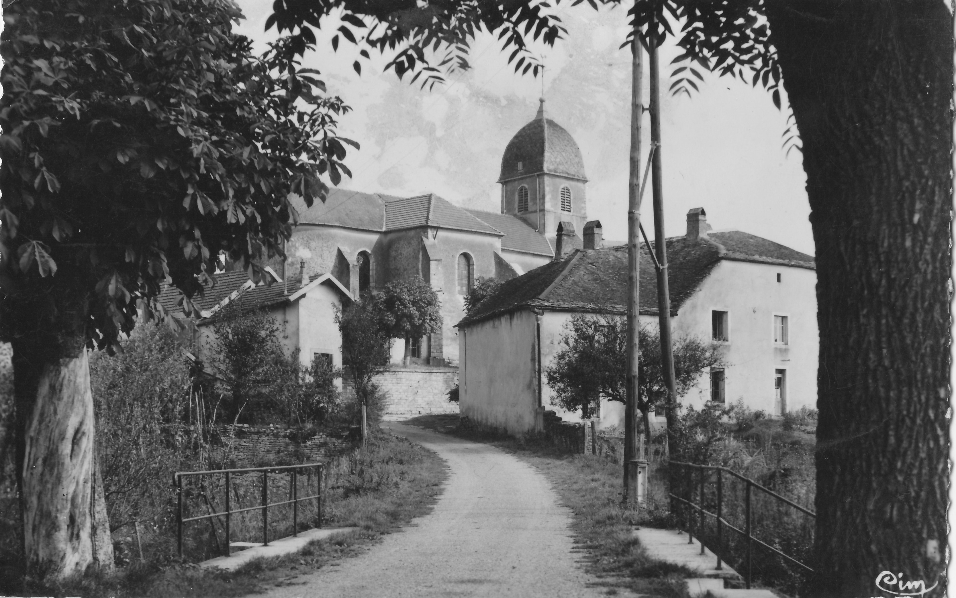 Carte postale ancienne montrant le chemin du lavoir a Rioz vers 1918